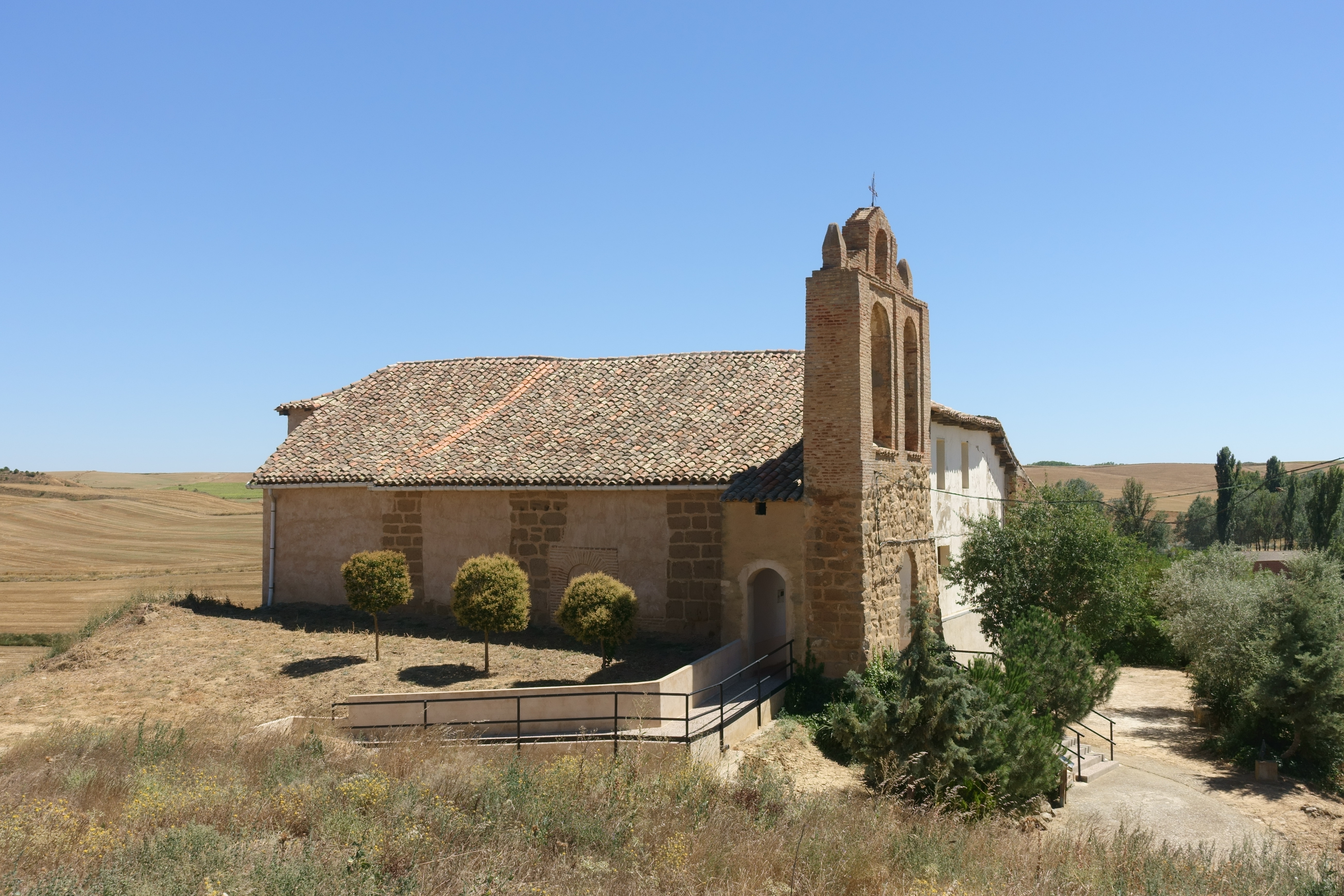 Iglesia de San Pedro Apóstol, Villanueva de la Condesa (Valladolid, España).